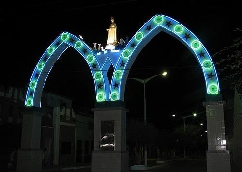 Arco de Nossa Senhora de Fátima, monumento de fé e beleza da cidade.